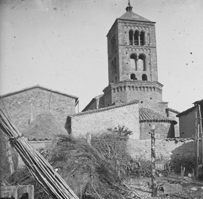 Absis de l'església de Santa Eugènia de Berga. Josep Salvany i Blanch (1916)